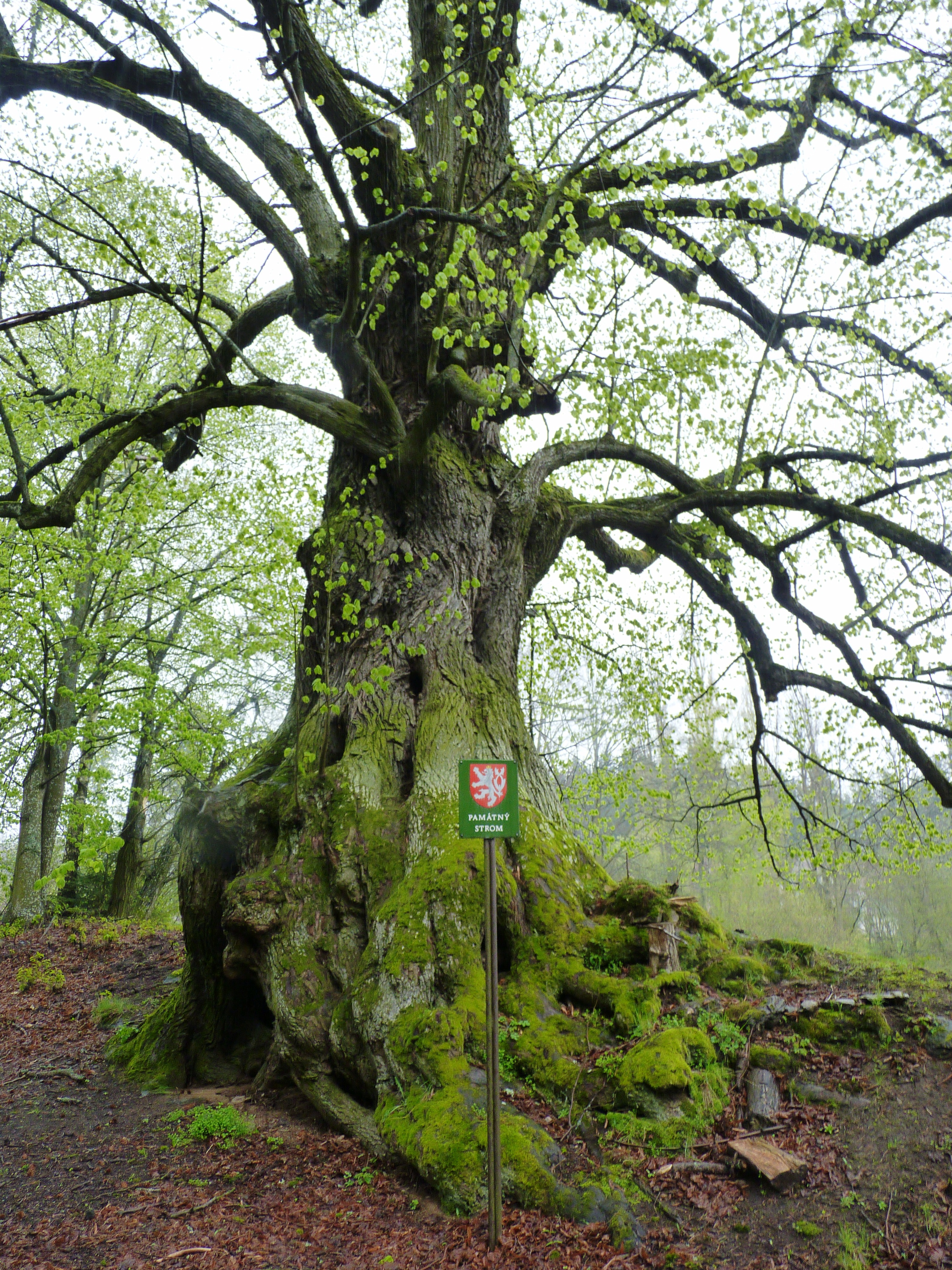 Lešišovská lípa na jaře 2017.